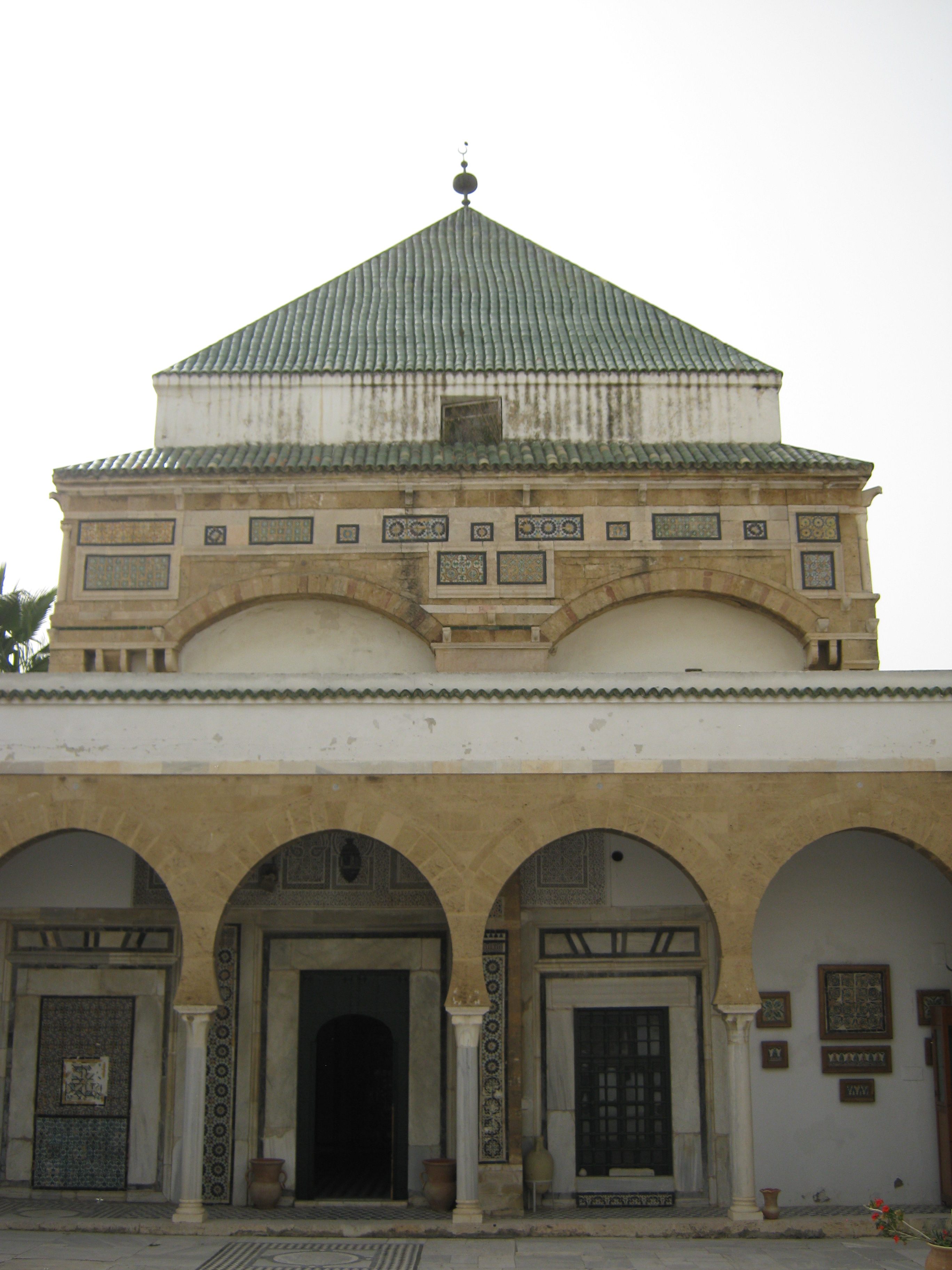 Zaouiet Sidi Kacem Jélizi